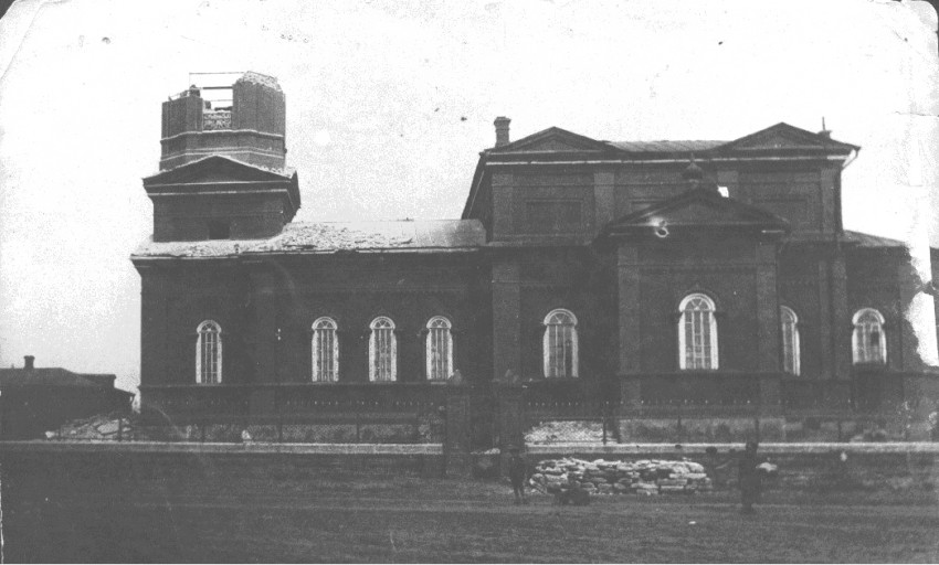 Покровский собор в городе Шахты Ростовской области РФ